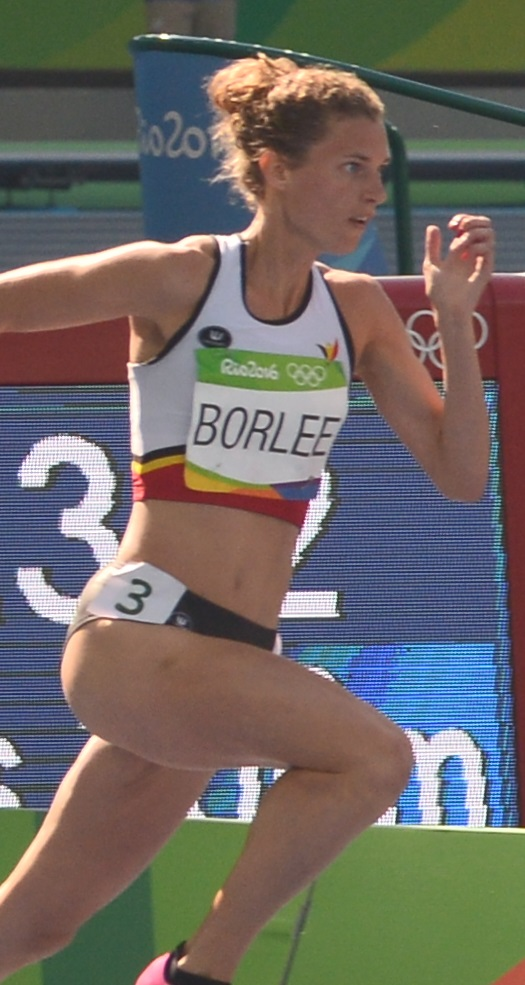 Olivia Borlée dans la 1er série du 200m aux JO de Rio 2016